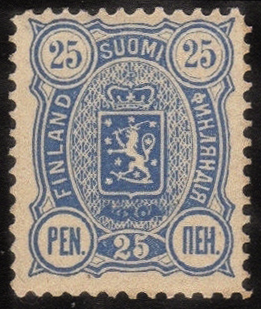 Марка Великого княжества Финляндского, седьмой выпуск, 1889, 25 пенни